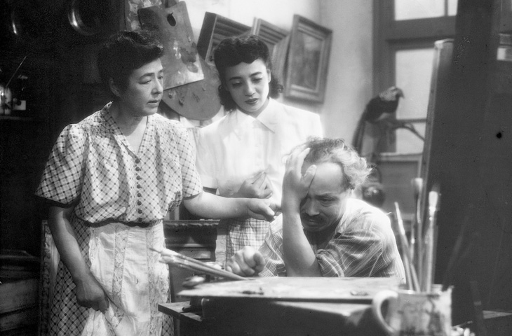 From left to right: Chieko Higashiyama, Kuniko Miyake and Ichirō Sugai in Shōzō (1948) directed by Keisuke Kinoshita